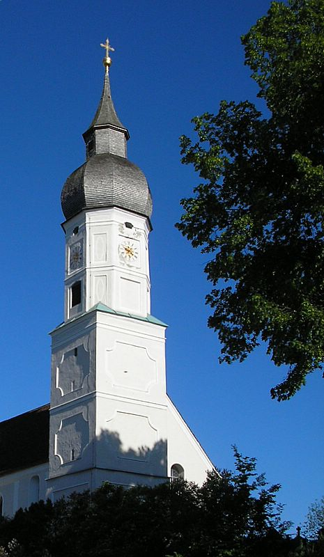 Bad Bayersoien (Landkreis Garmisch-Partenkirchen, Oberbayern). Pfarrkirche St. Georg. Ansicht von Nordwesten. Eigene Aufnahme, Mai 2007 / Bad Bayersoien (Upper Bavaria, Germany). Parish church St. George. View from the north-west. Own photo, May 2007